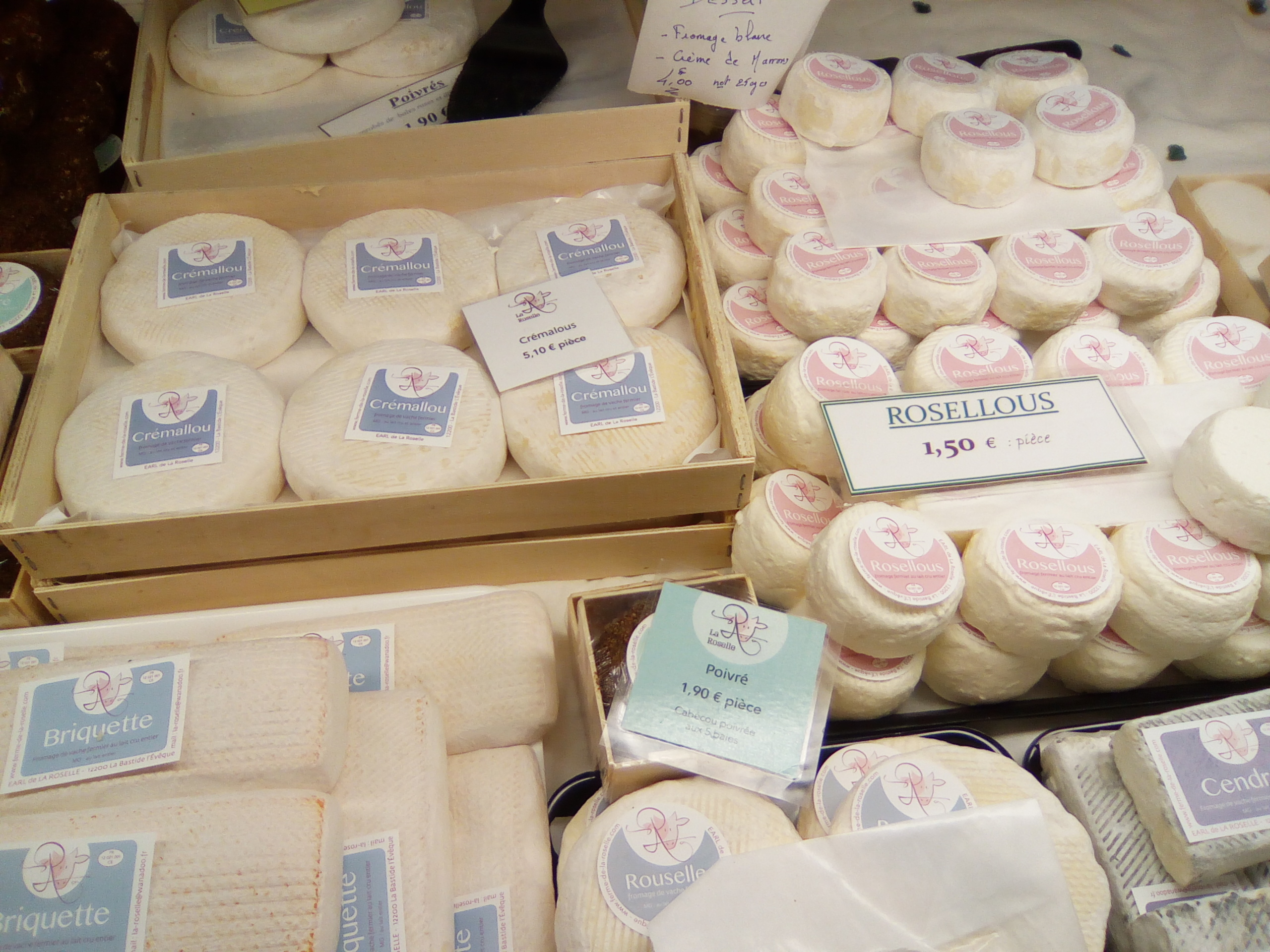 Fromages fermiers à pâte molle de la famille Mazars (agriculteurs à la ferme de la Roselle) au Salon Saveurs des Plaisirs Gourmands.